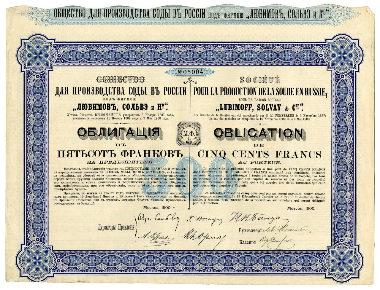 Облигация в 500 фр. на предъявителя Общества для производства соды в России под фирмою "Любимов, Сольве и Ко". Москва, 1900 г.